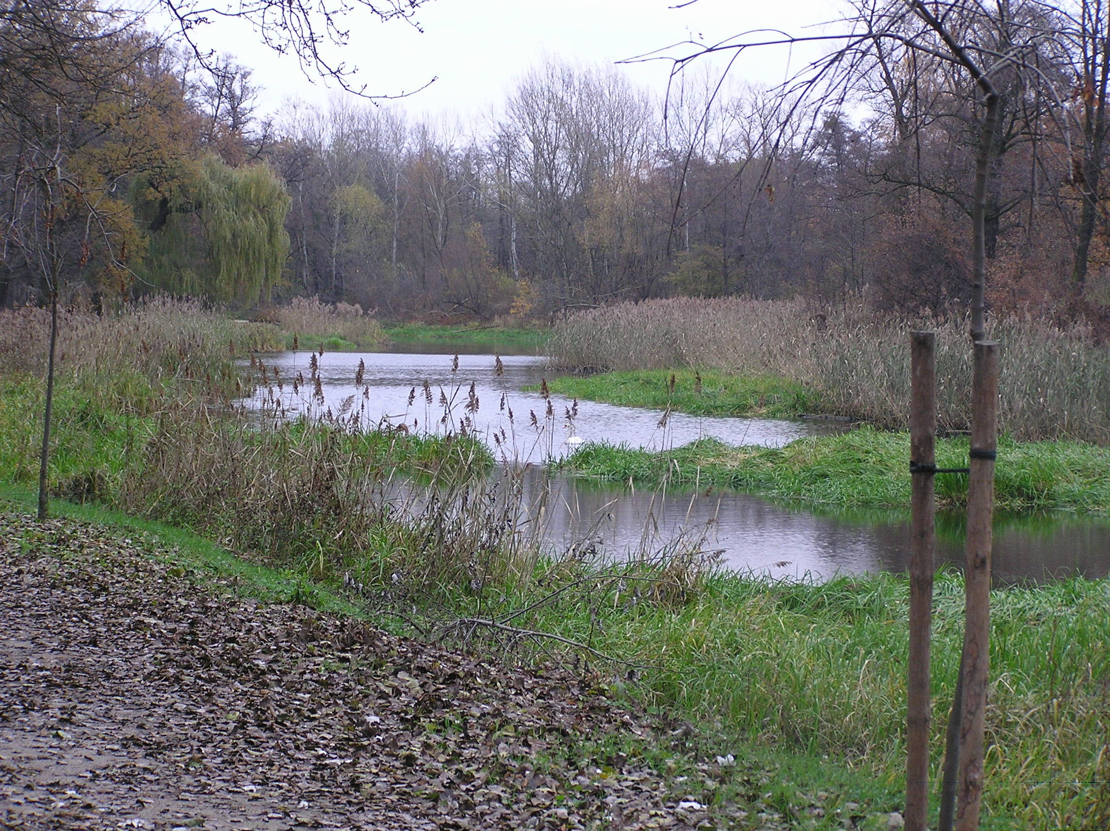 Wrocław, Park Wschodni, rzeka Oława Górna